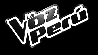 Logo del programa de televisión "La voz Perú"